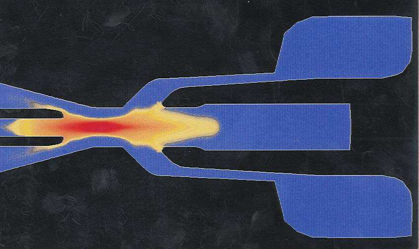 Arc-disjoncteur